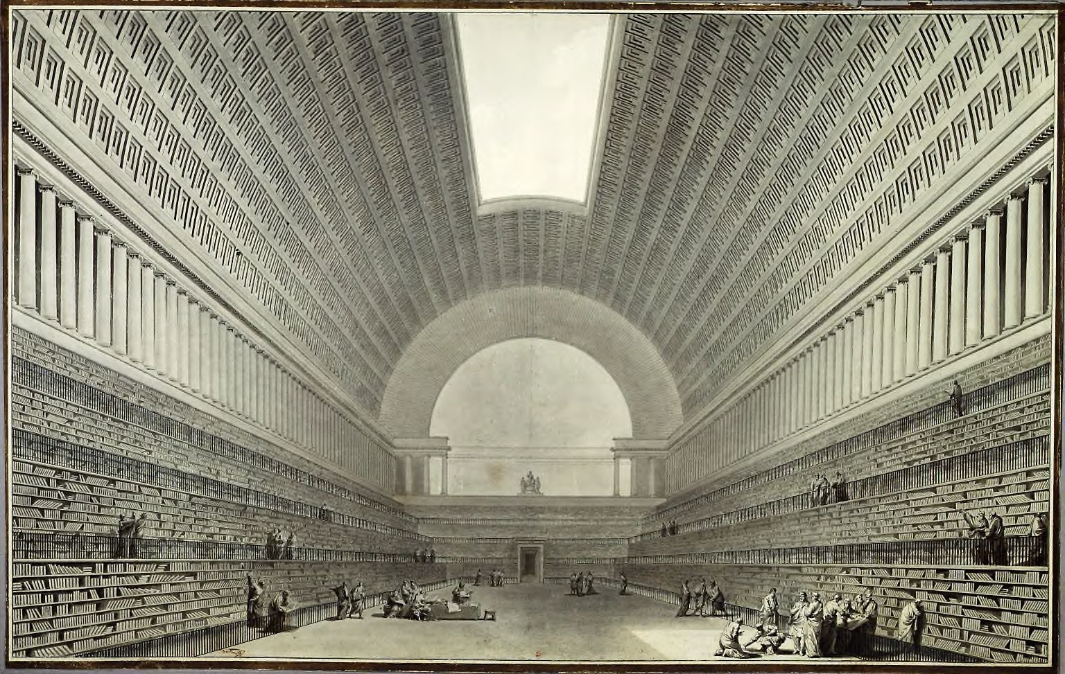 [Pl. 36]. Vue intérieure de la nouvelle salle projetée pour l'agrandissement de la bibliothèque du Roi : [perspective intérieure] / Boullée invenit